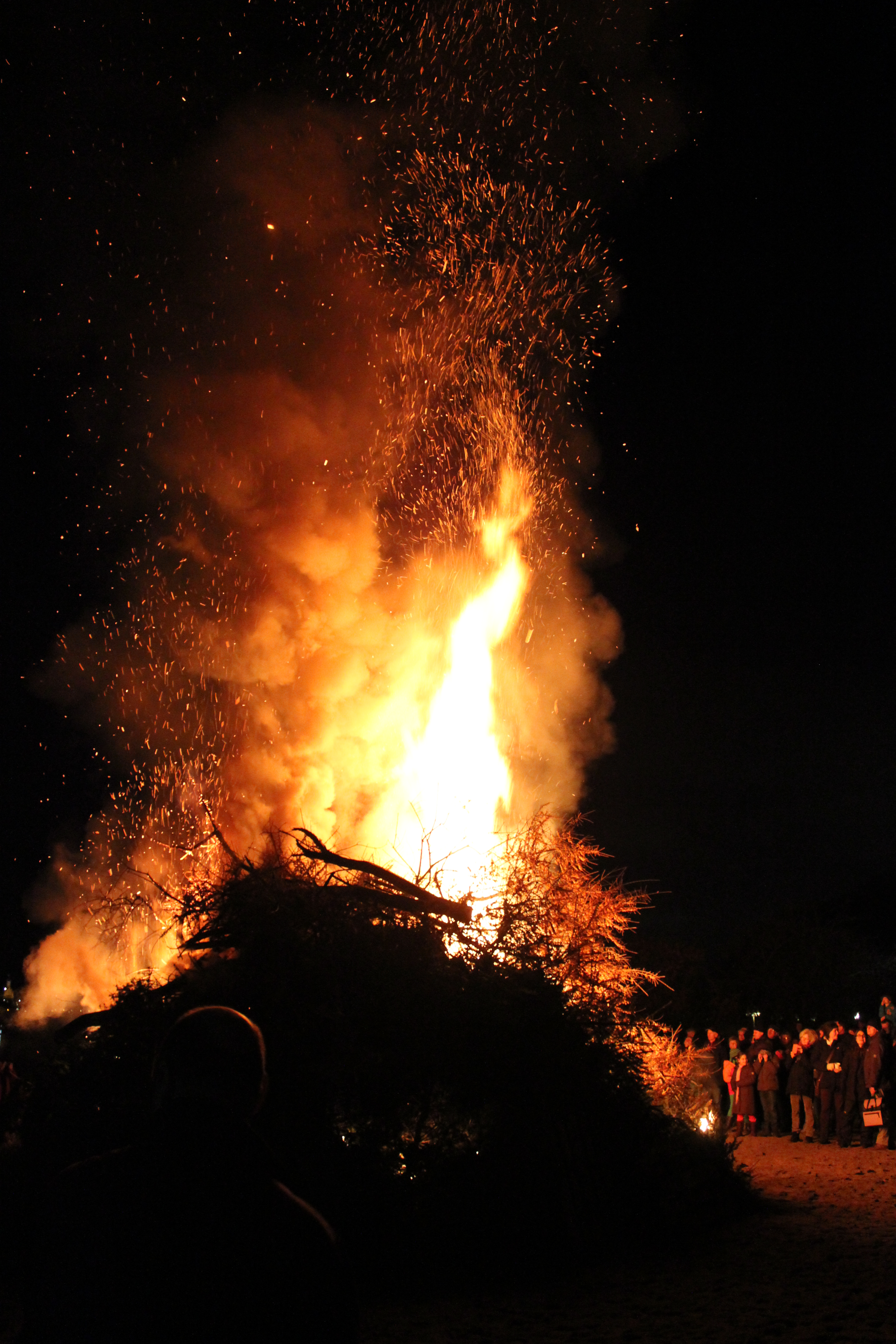 Biikebrennen in Wassersleben (2014), nach der Entzündung